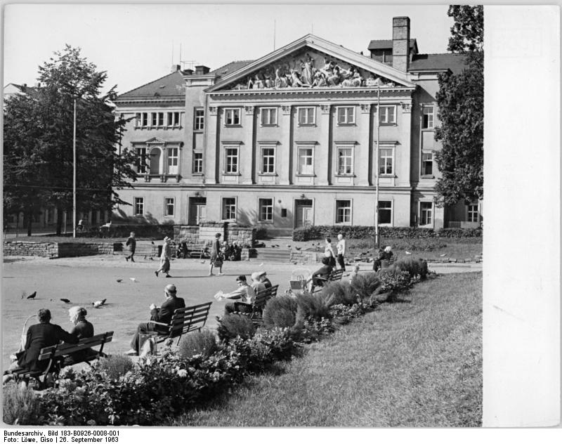 Zentralbild-Löwe 26.9.1963 Deutsch-Sorbisches Volkstheater in Bautzen Mit Beginn der diesjährigen Spielzeit wurde das Deutsch-Sorbische Volkstheater unter Intendant Eberhard Sprink in Bautzen gegründet. Gegenwärtig verfügen 2.224 sorbische Besucher über ein Theateranrecht. Das Deutsch-Sorbische Volkstheater gibt Gastspiele in Gemeinden des zweisprachigen Lausitzer Gebietes bis in den Bezirk Cottbus hinein. UBz: Aussenansicht des neuen Theaters. Information added by Wikimedia users.